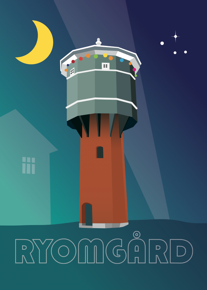 Ryomgård vandtårn. Grafisk repræsentation til festuge 2015